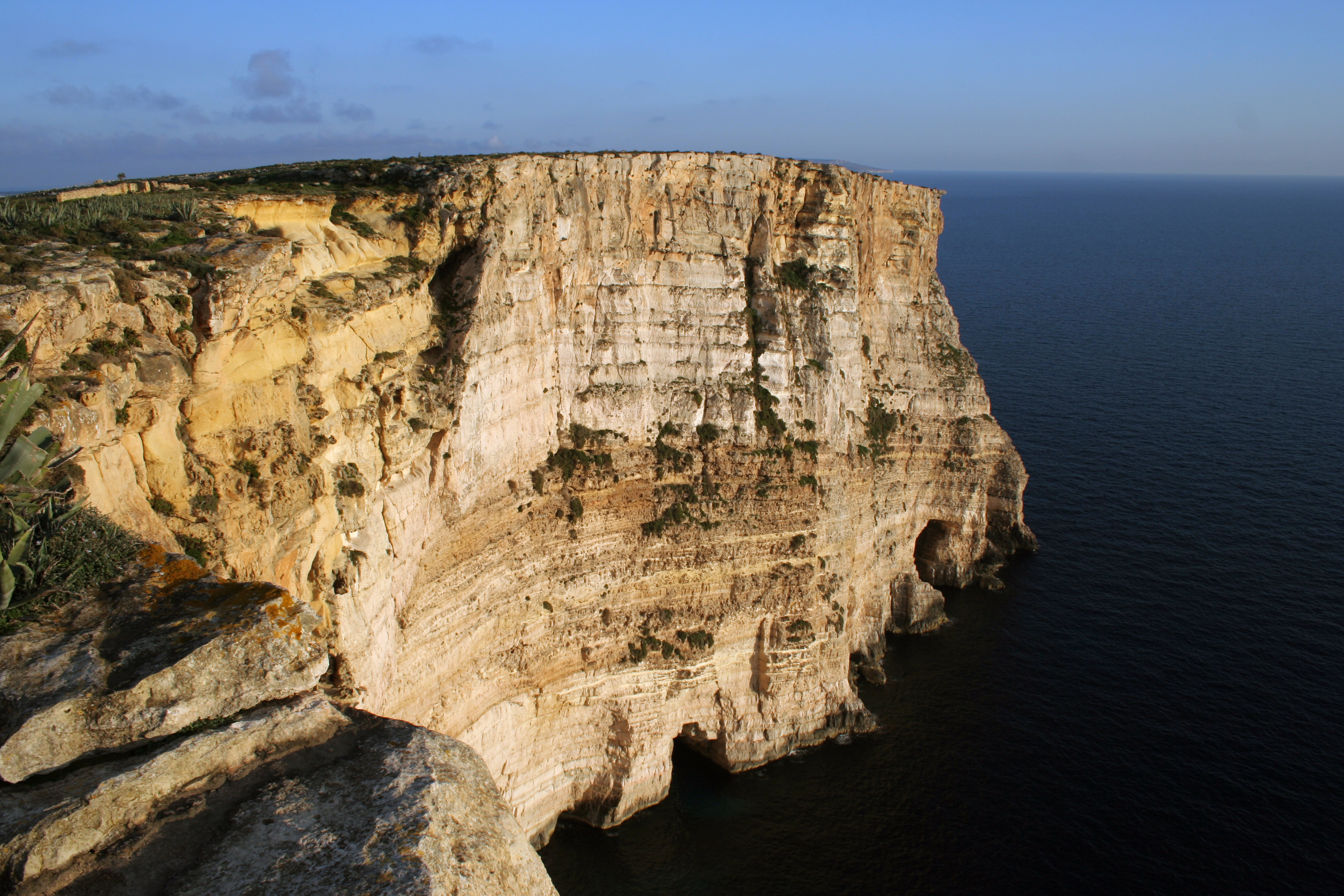 Gozo, Ta'Cenc, cliffs